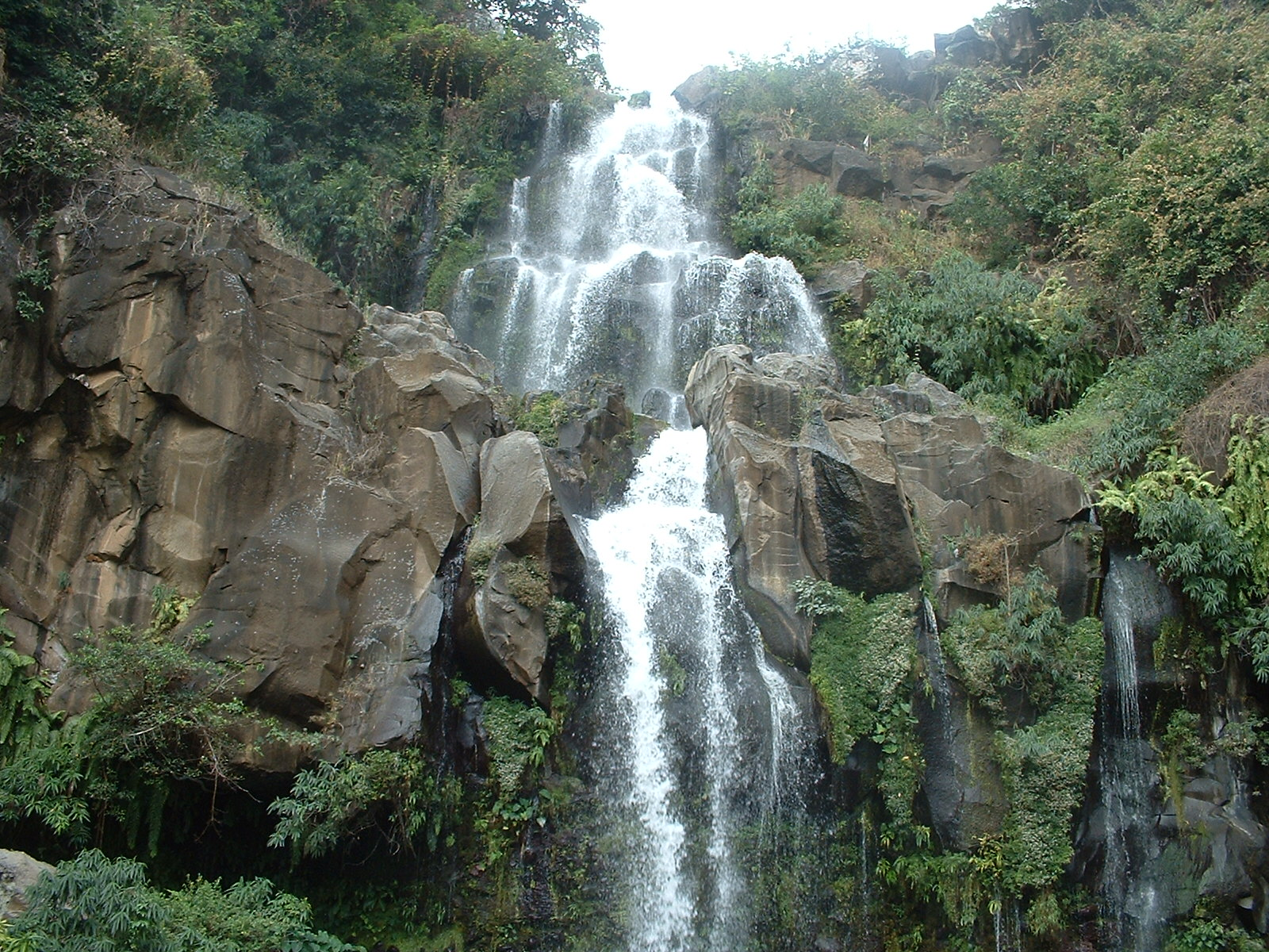 Photo personnelle de David Remi , cascade du bassin Cormoran, ravine Saint-Gilles, île de La Réunion.